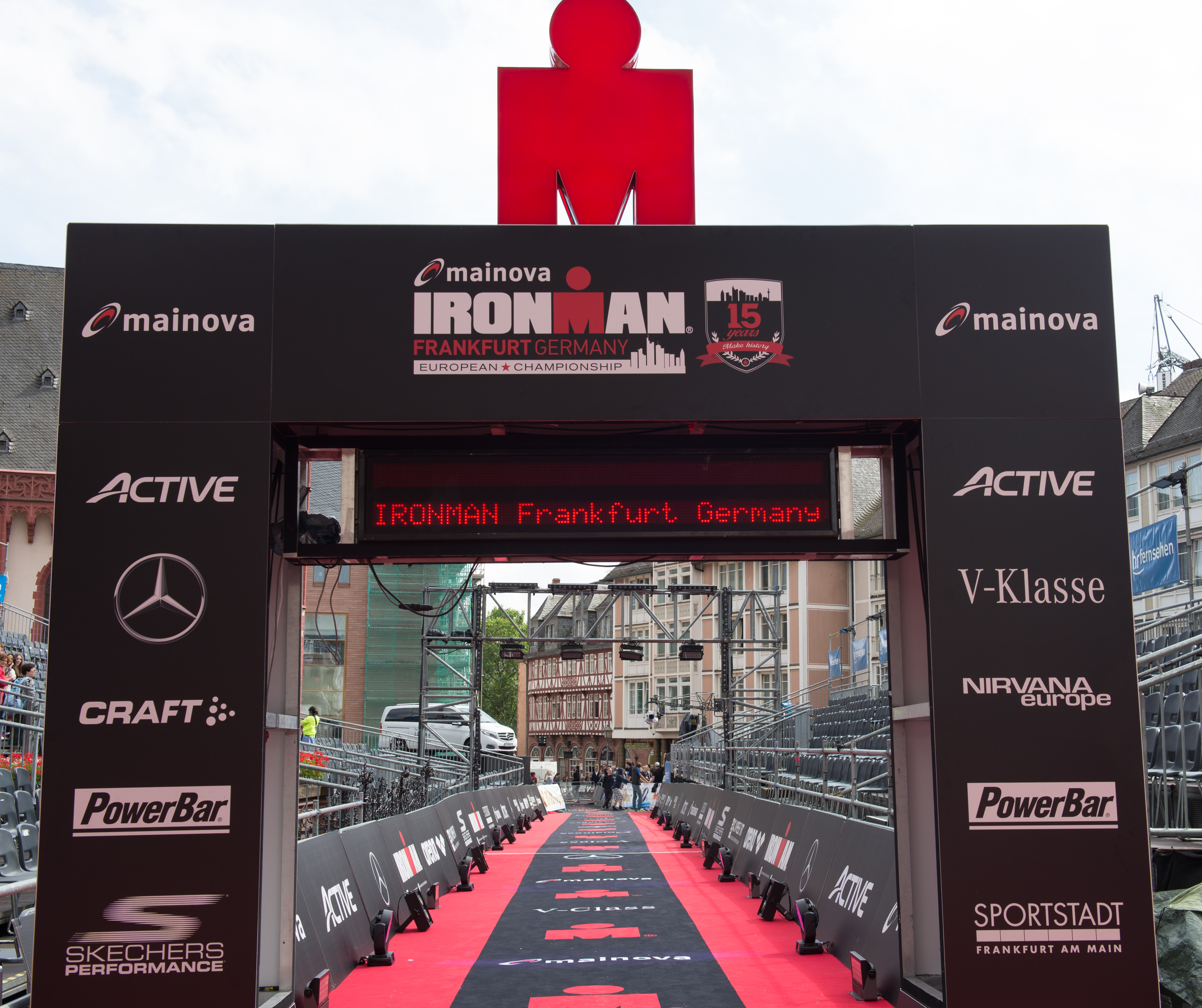 Ironmain 2016 Frankfurt